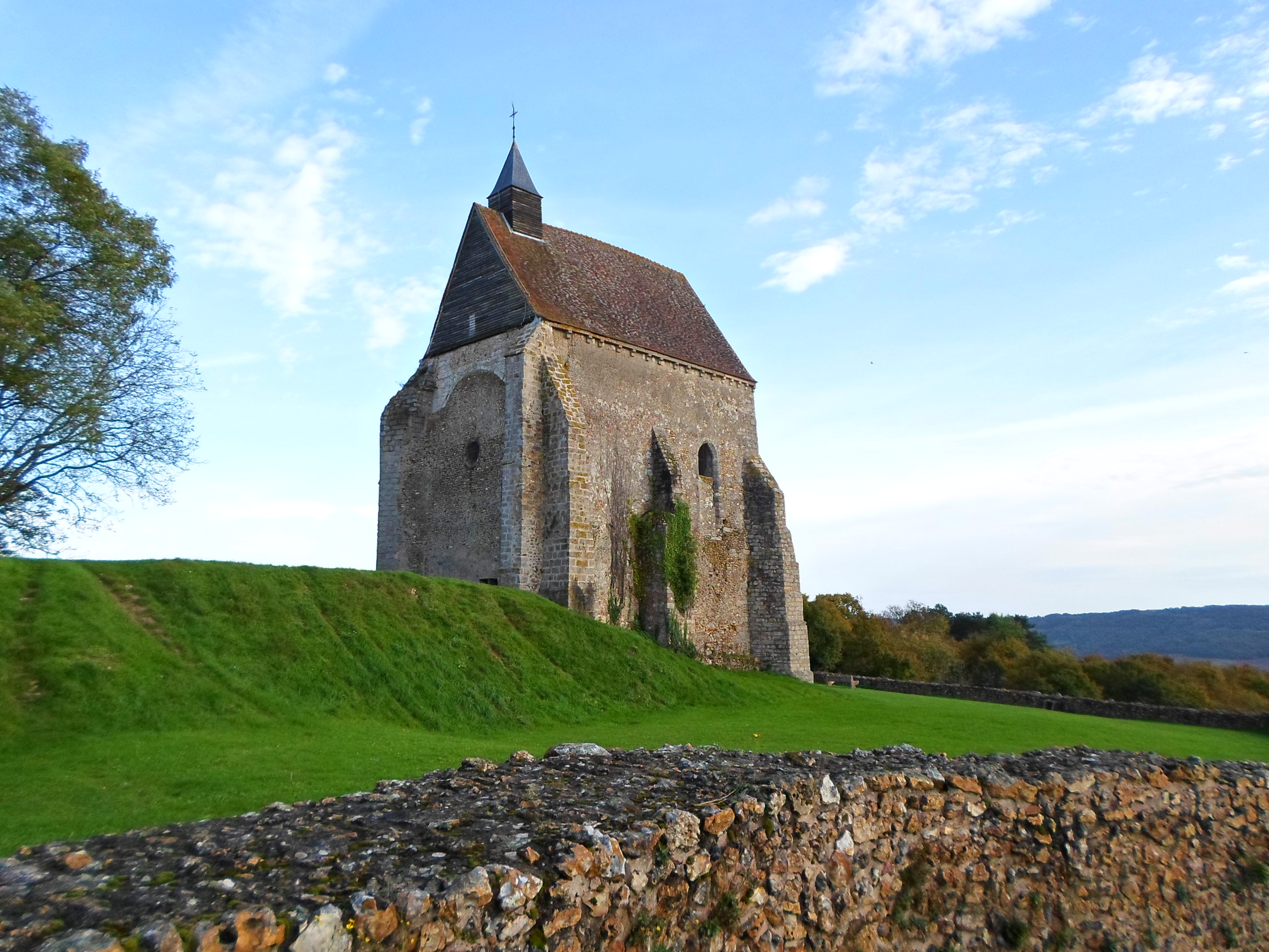 la chapelle de Vauguillain vue de la Poterne (saint-Julien-du-Sault) Yonne, France